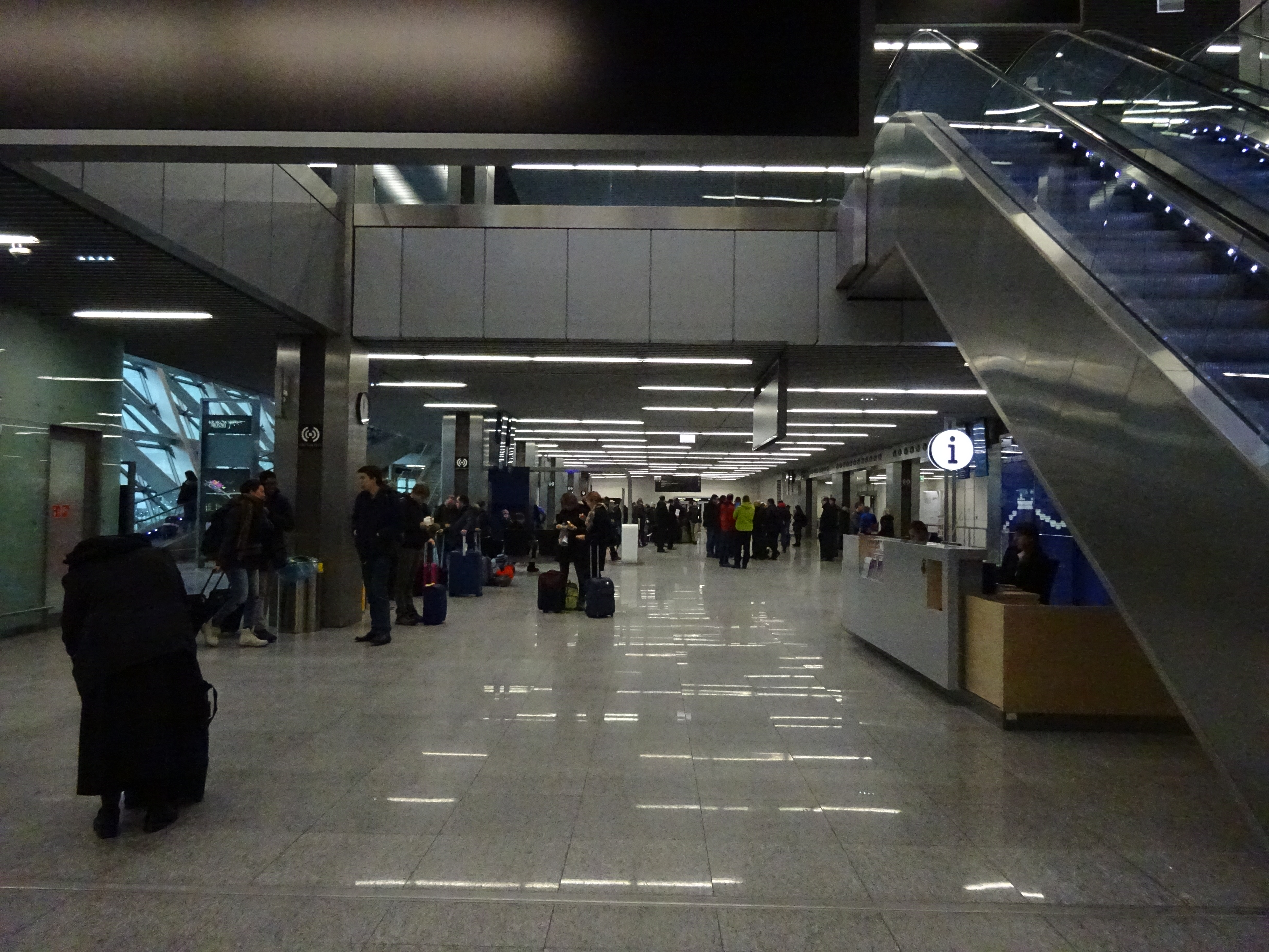 Port Lotniczy Kraków-Balice - wnętrze terminalu - górna płyta. Po remoncie, 2016